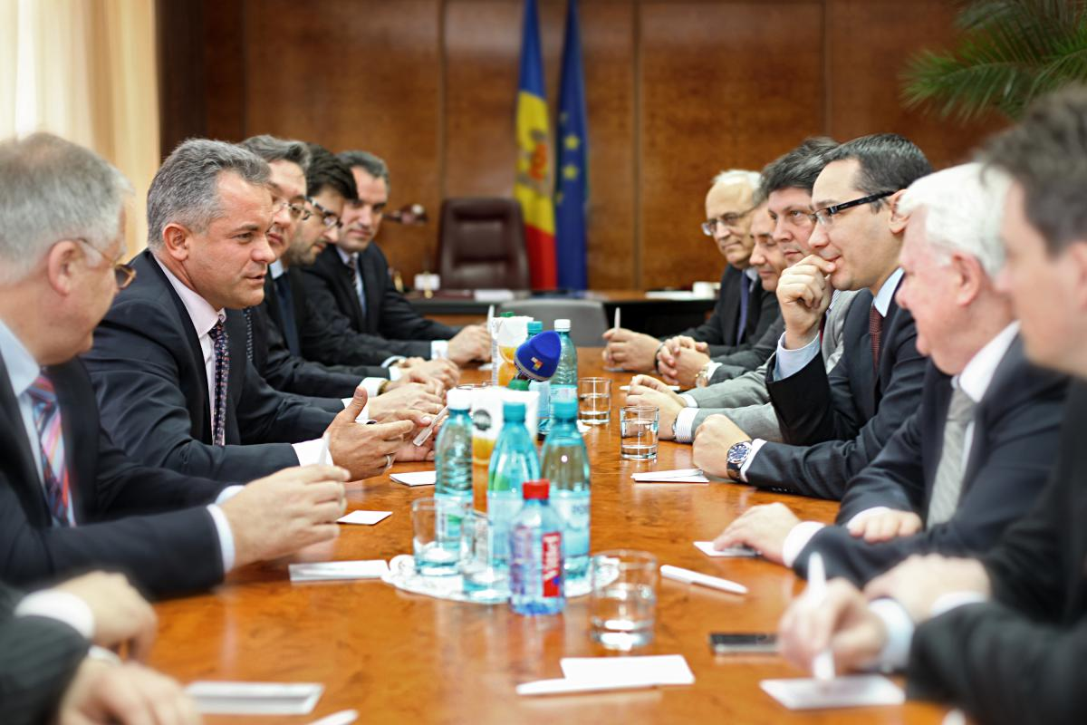 Întâlnirea dintre Vlad Plahotniuc şi Victor Ponta (Chişinău, 2011)